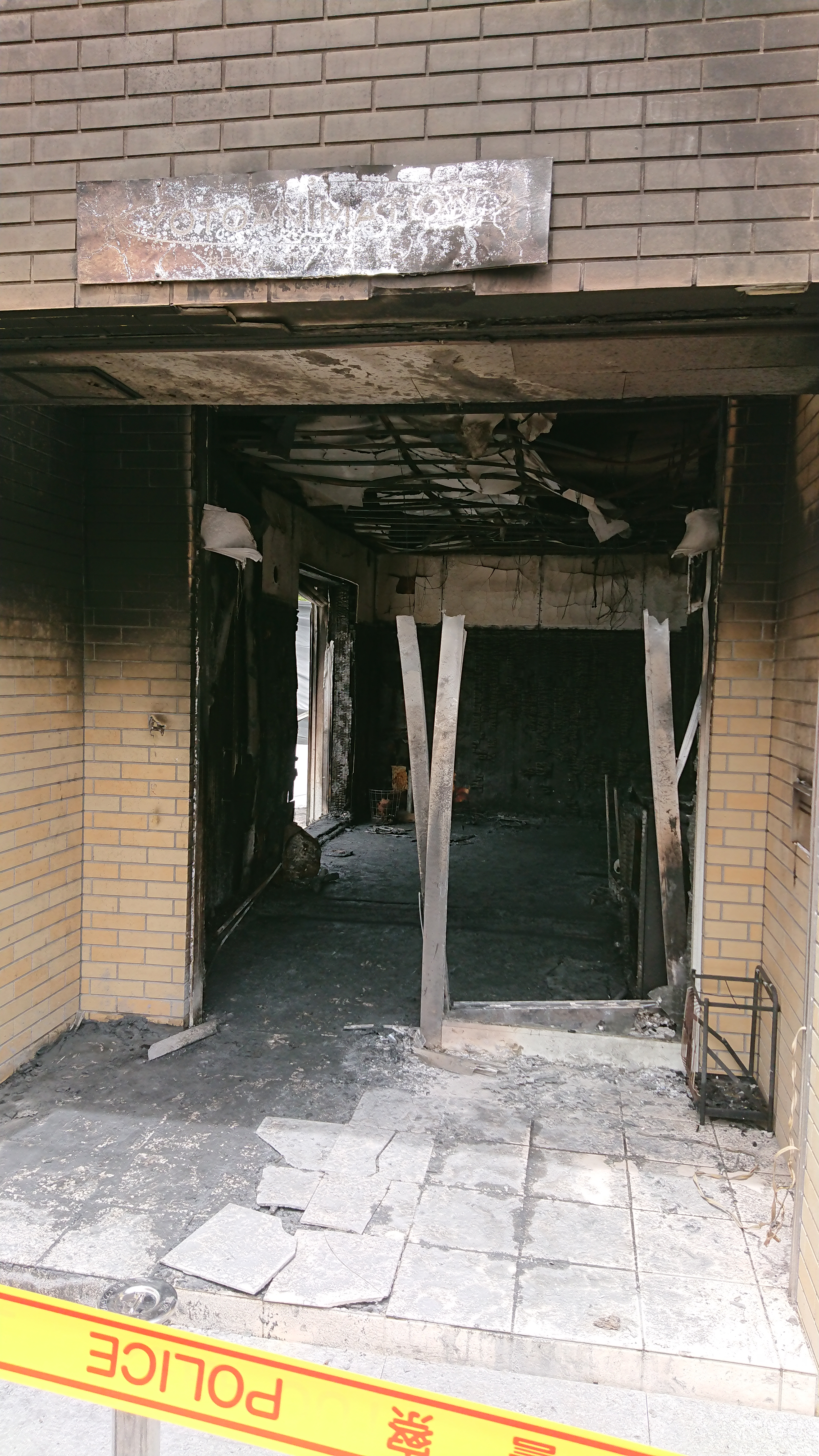 放火された京都アニメーション第一スタジオ入口（京都市伏見区）